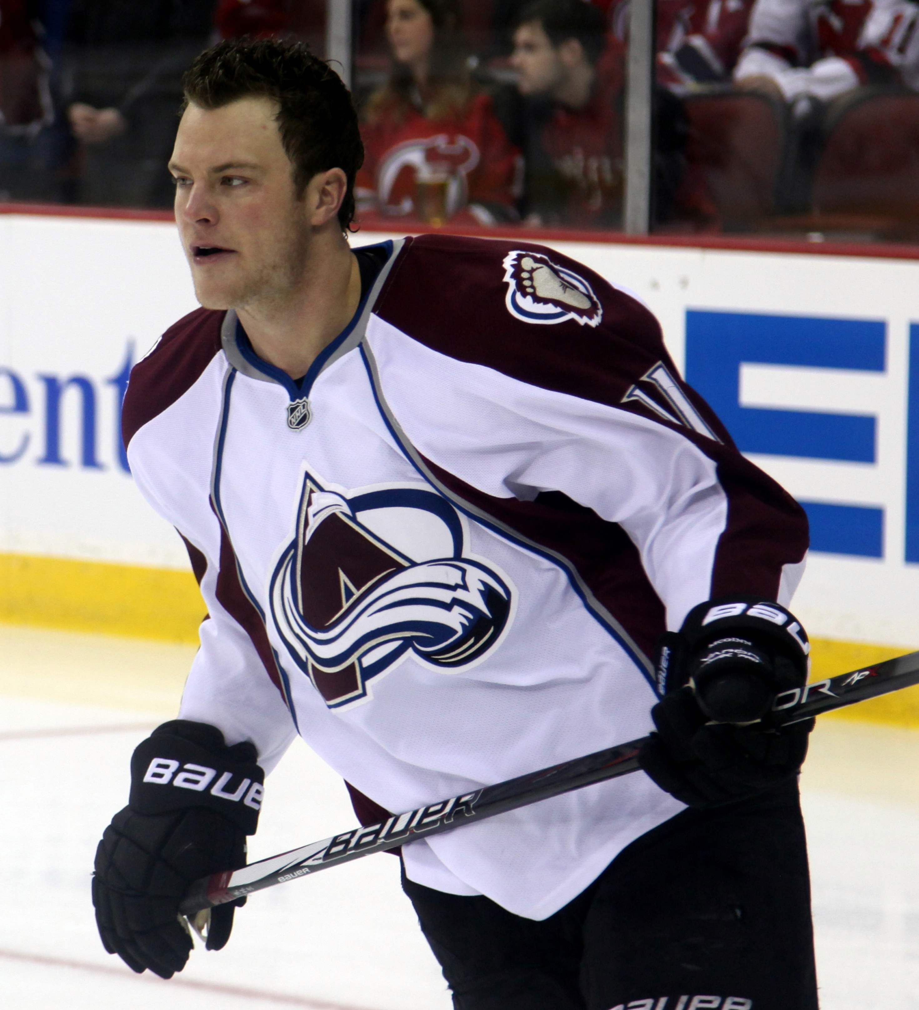 Jamie McGinn in February 2014.